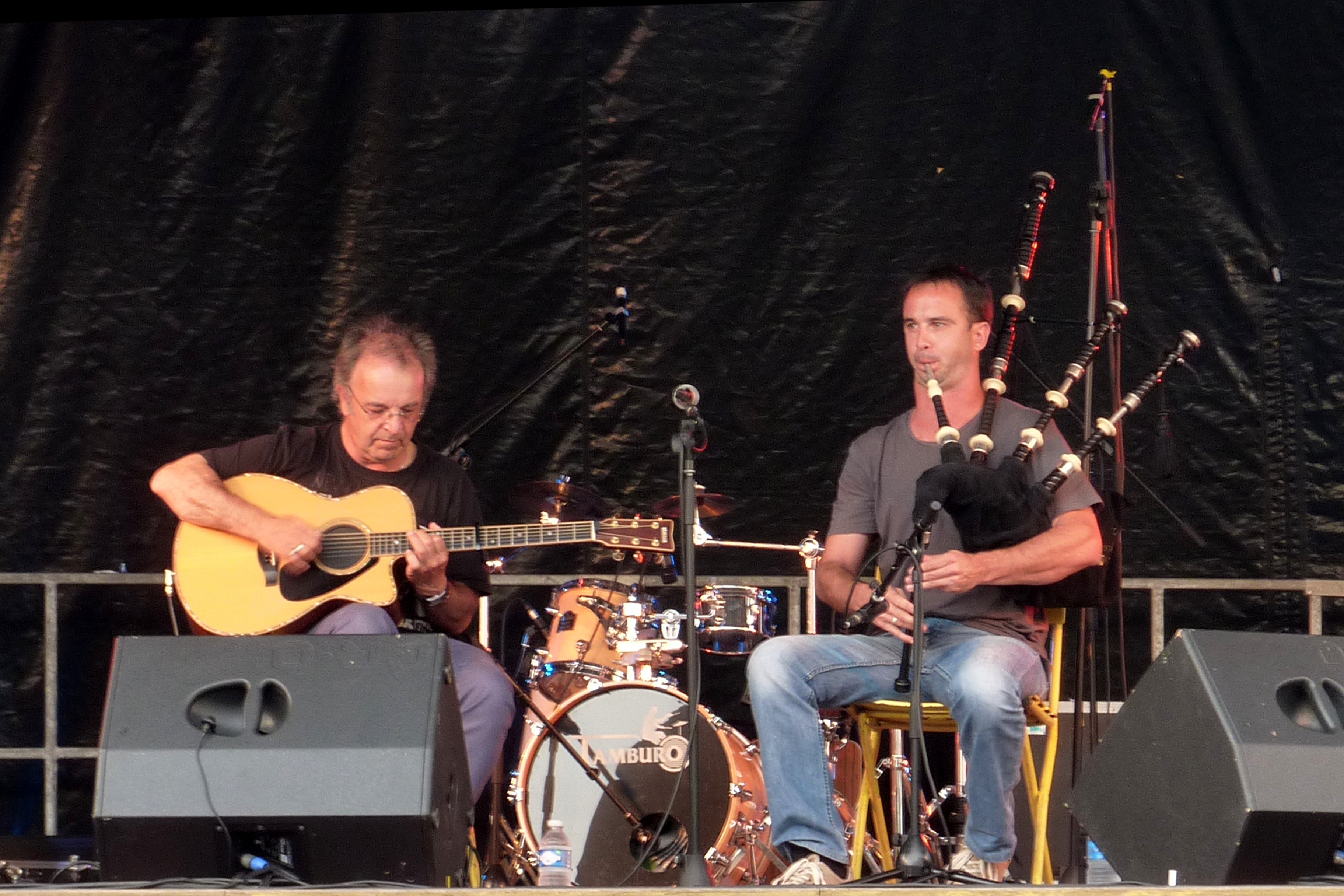 Soig Sibéril et Cédric Le Bozec en fest-noz à Loudeac le 14 août 2013.